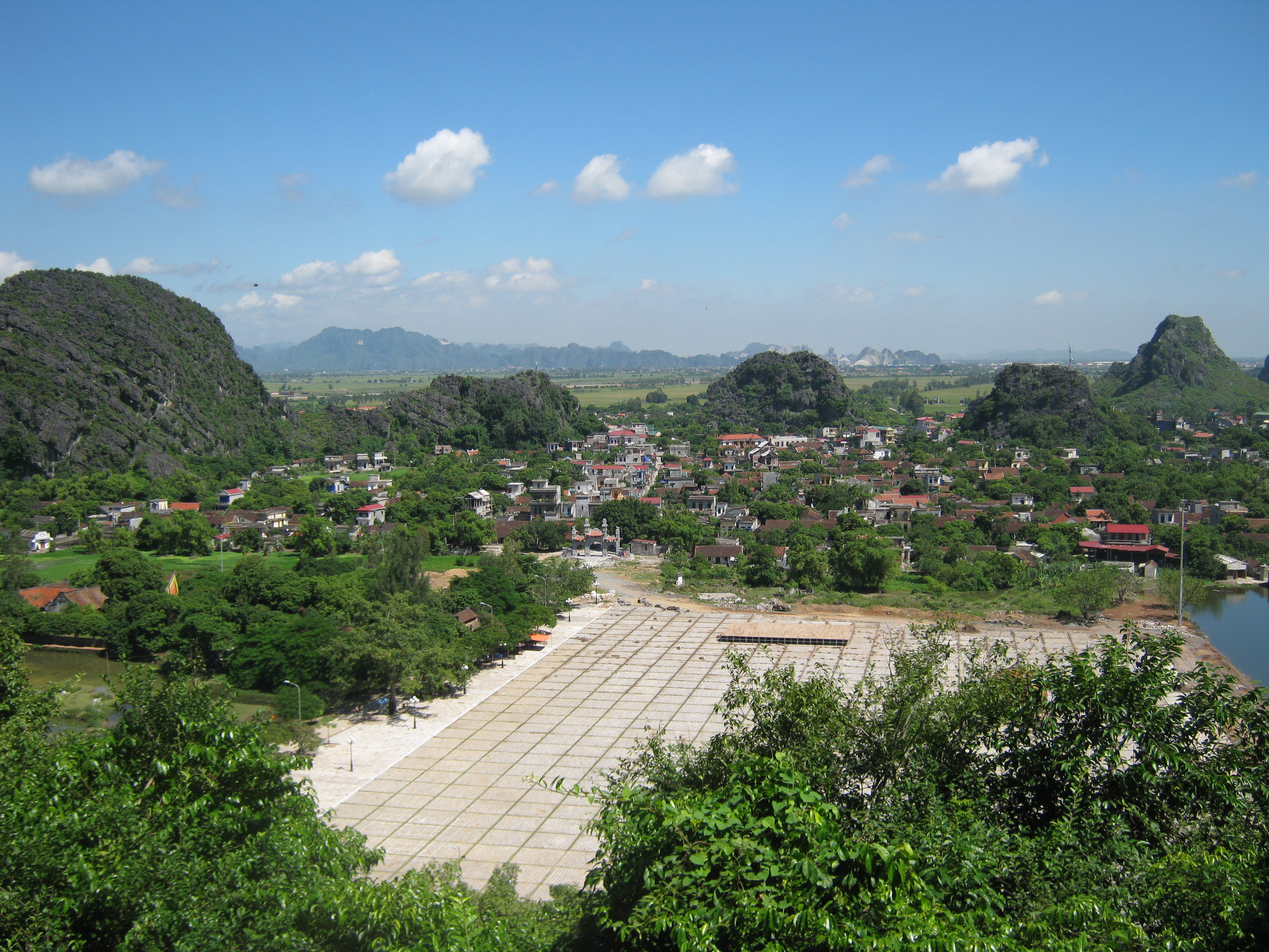 Phong cảnh cố đô Hoa Lư, Ninh Bình, mùa thu năm 2010